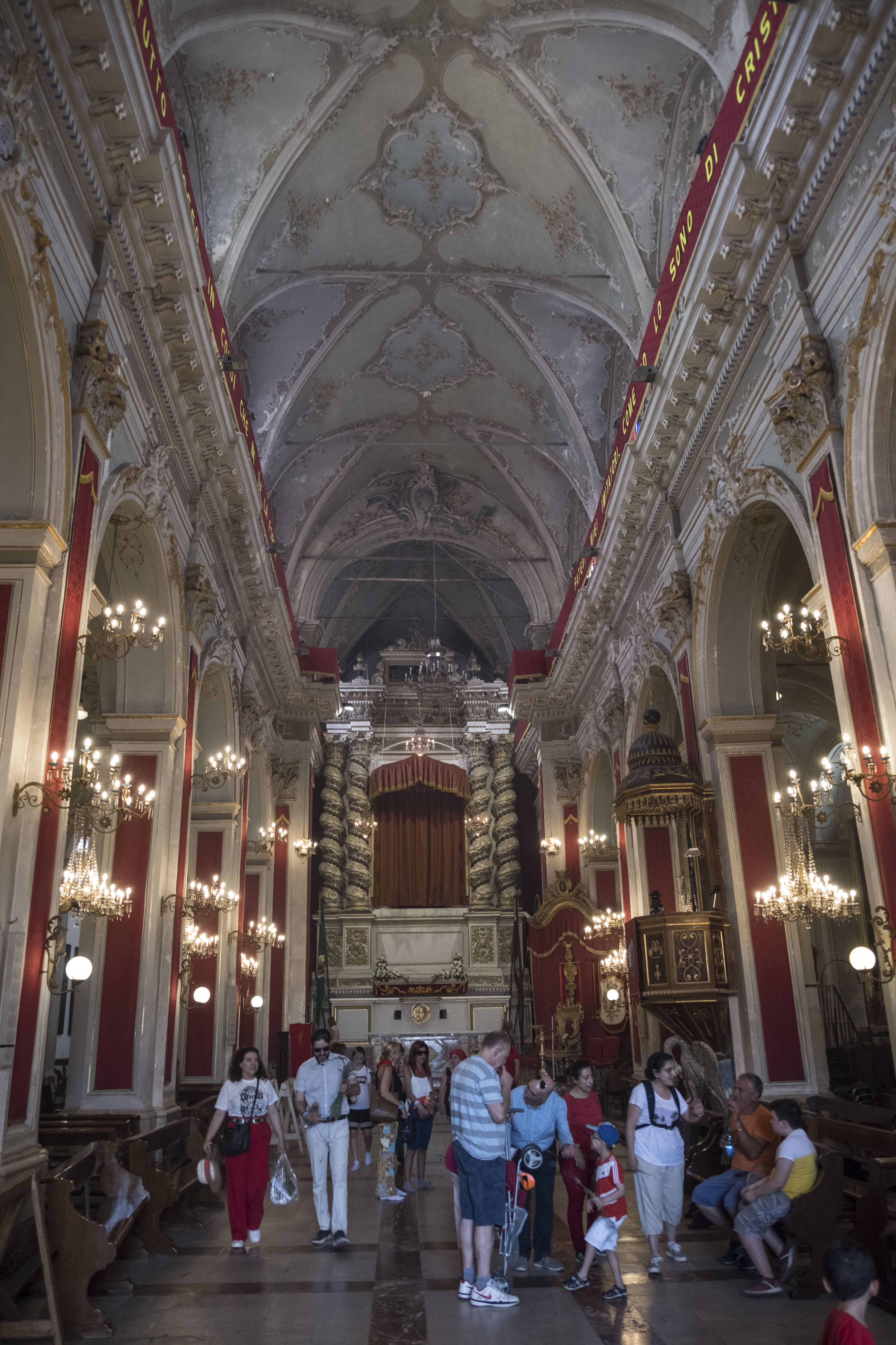 Interni chiesa di San Paolo durante la festa